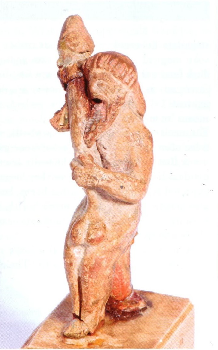 Etruskische Statue des griechischen Gottes Priapos